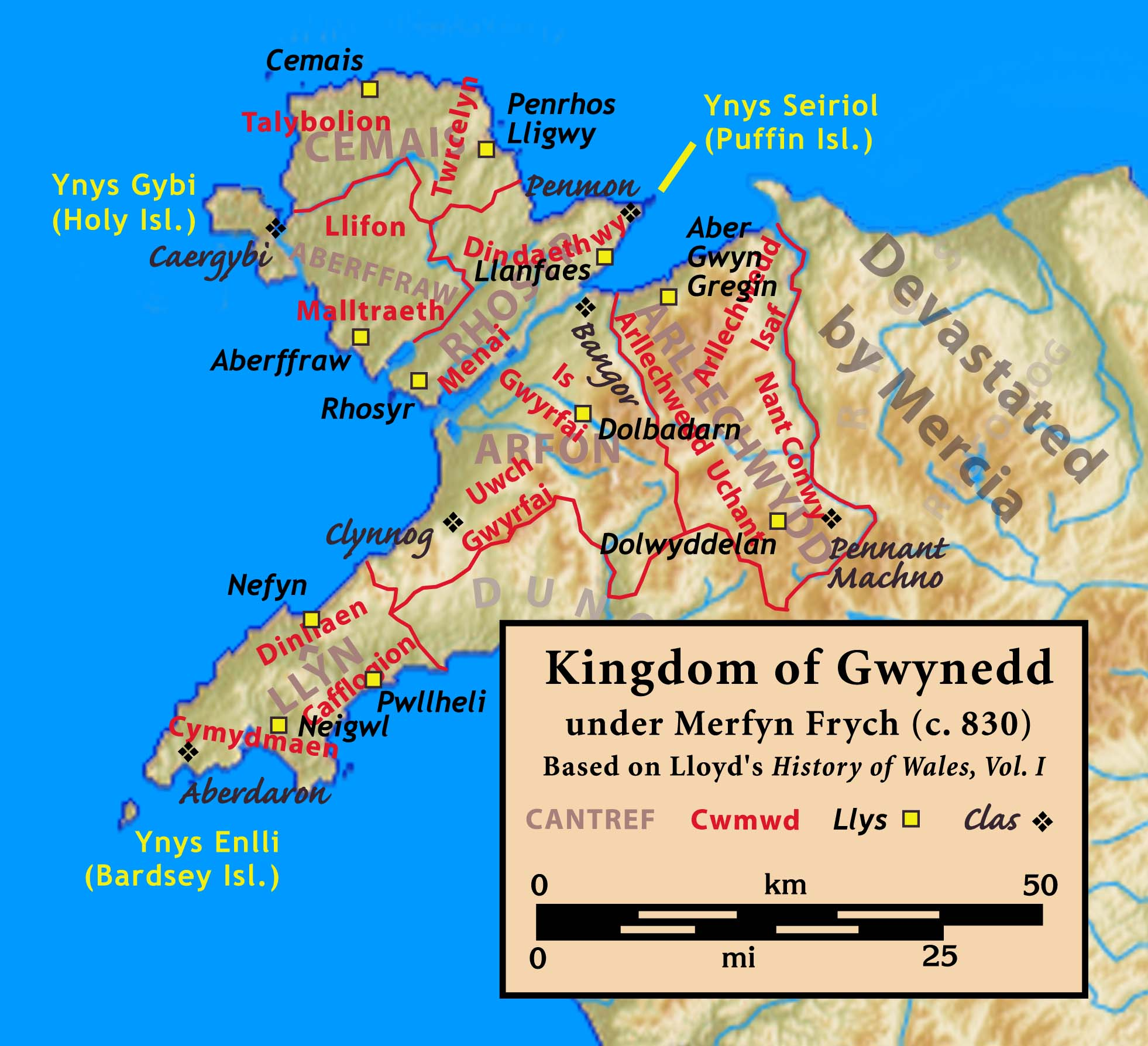 Kingdom of Gwynedd, c. 830